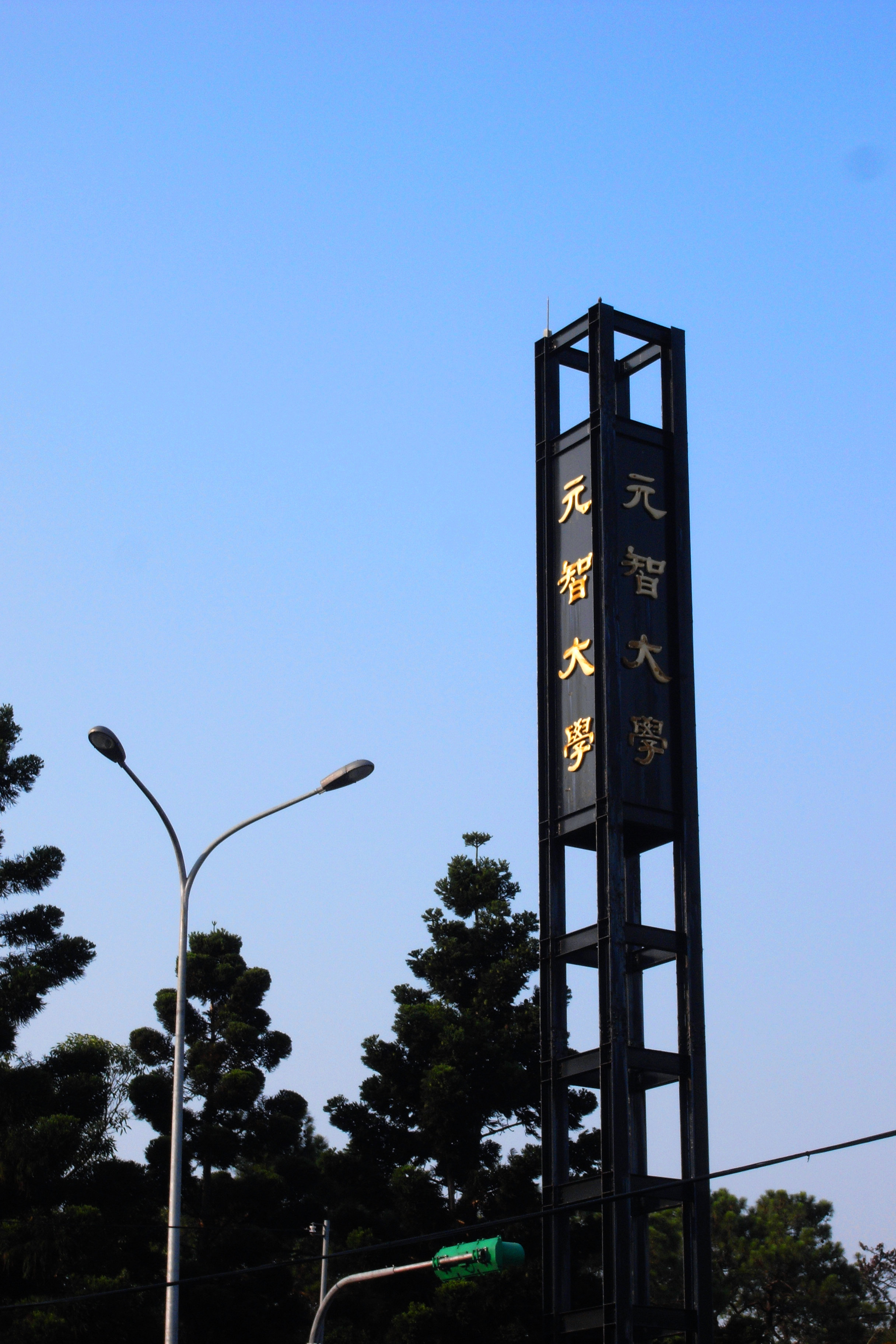 元智大學 風之塔